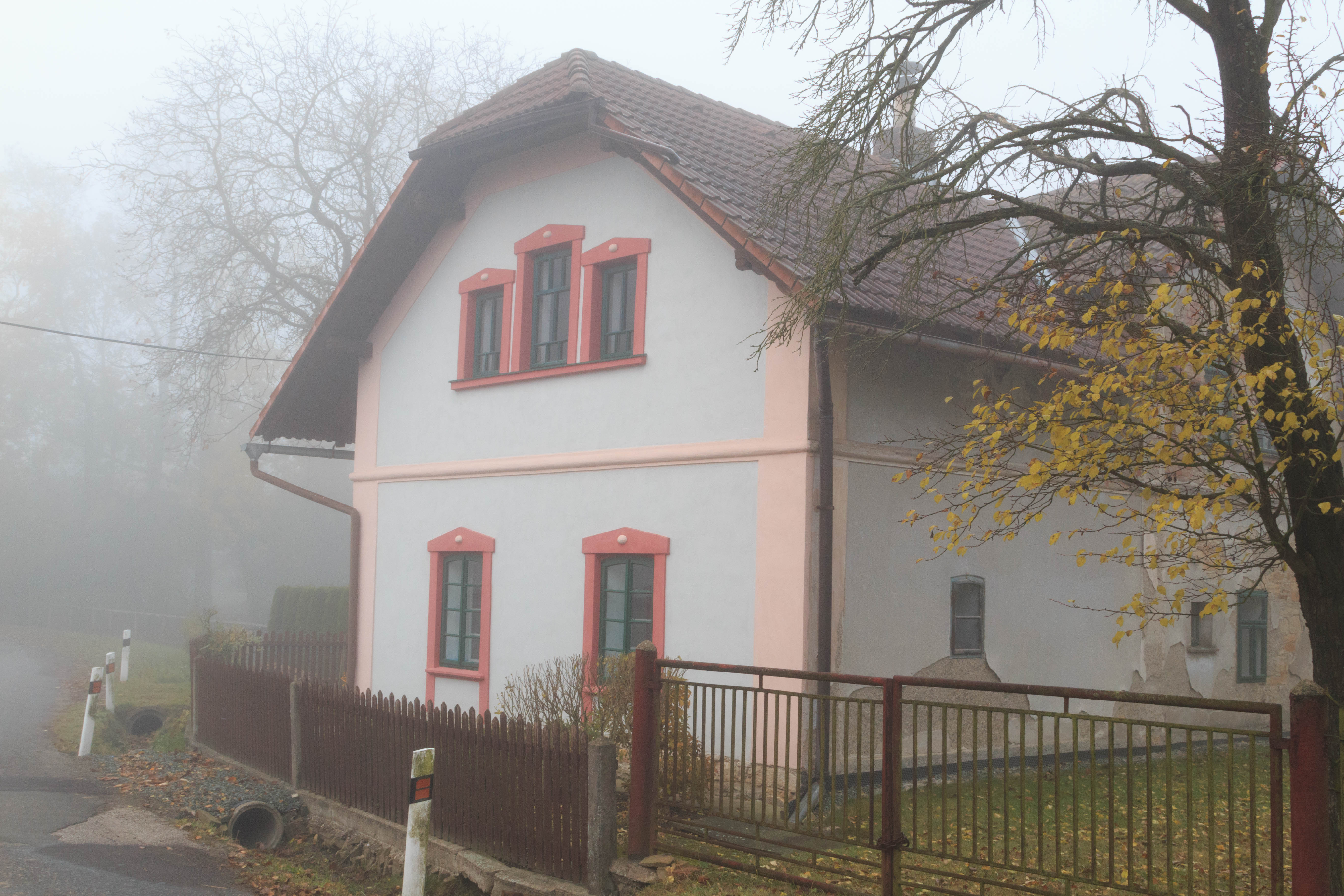 Ježkovice u Voděrad - č. 27